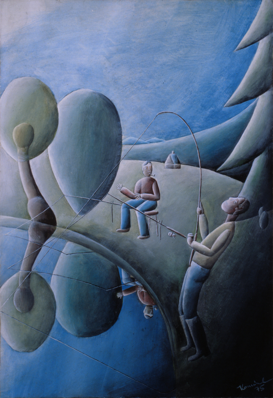 06. Bohumír Komínek, Rybáři (1975)